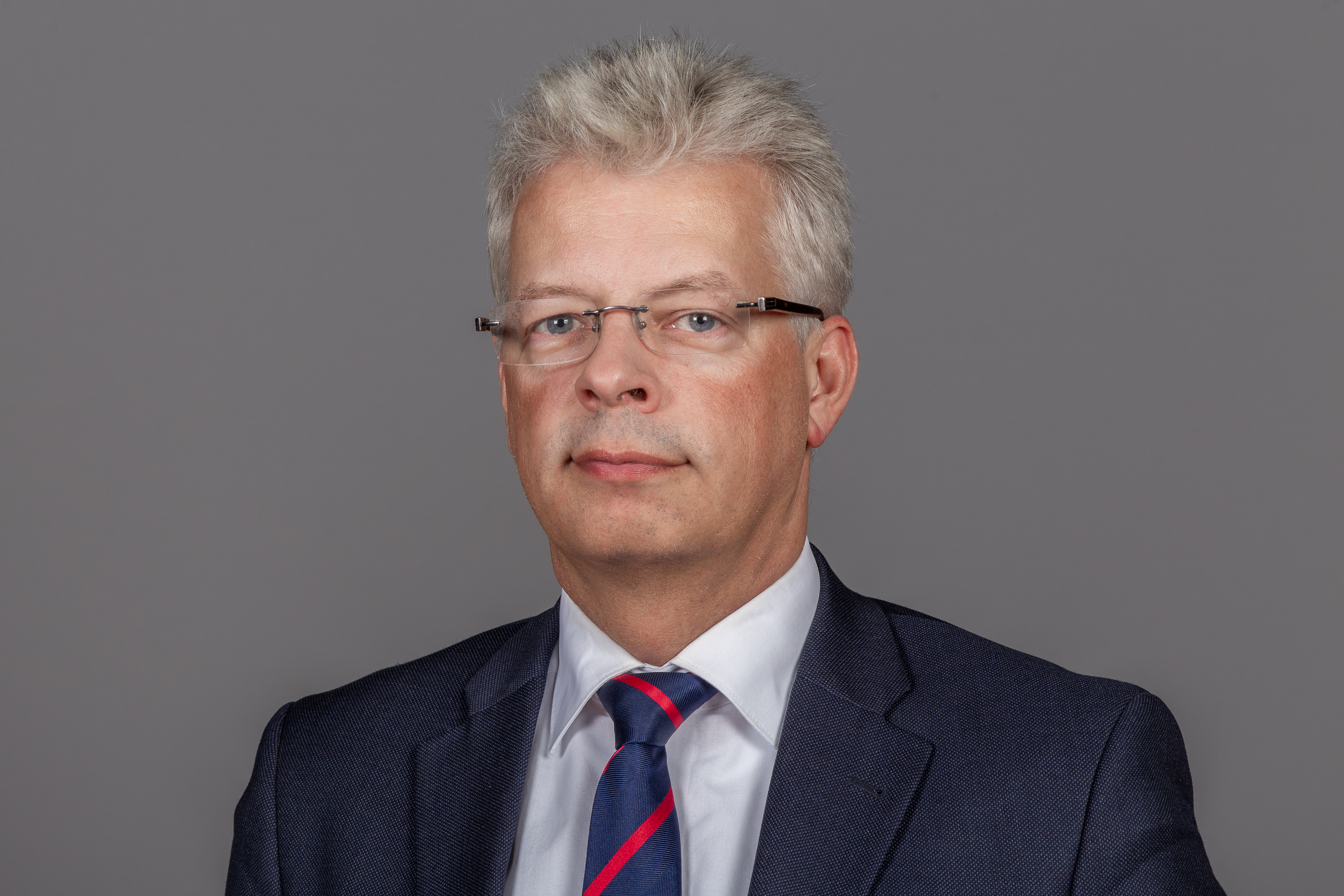 Abgeordnete(r) der Bürgerschaft der Freien und Hansestadt Hamburg Jan Quast